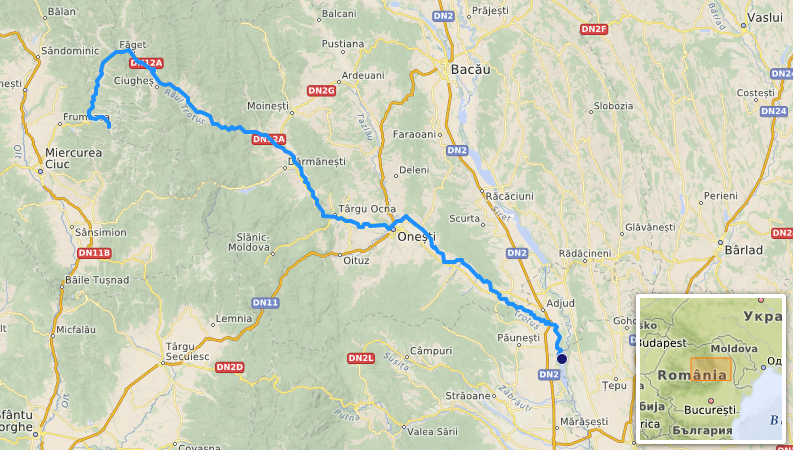 carte réalisée sur umap [1] This map may be incomplete, and may contain errors. Don't rely solely on it for navigation.